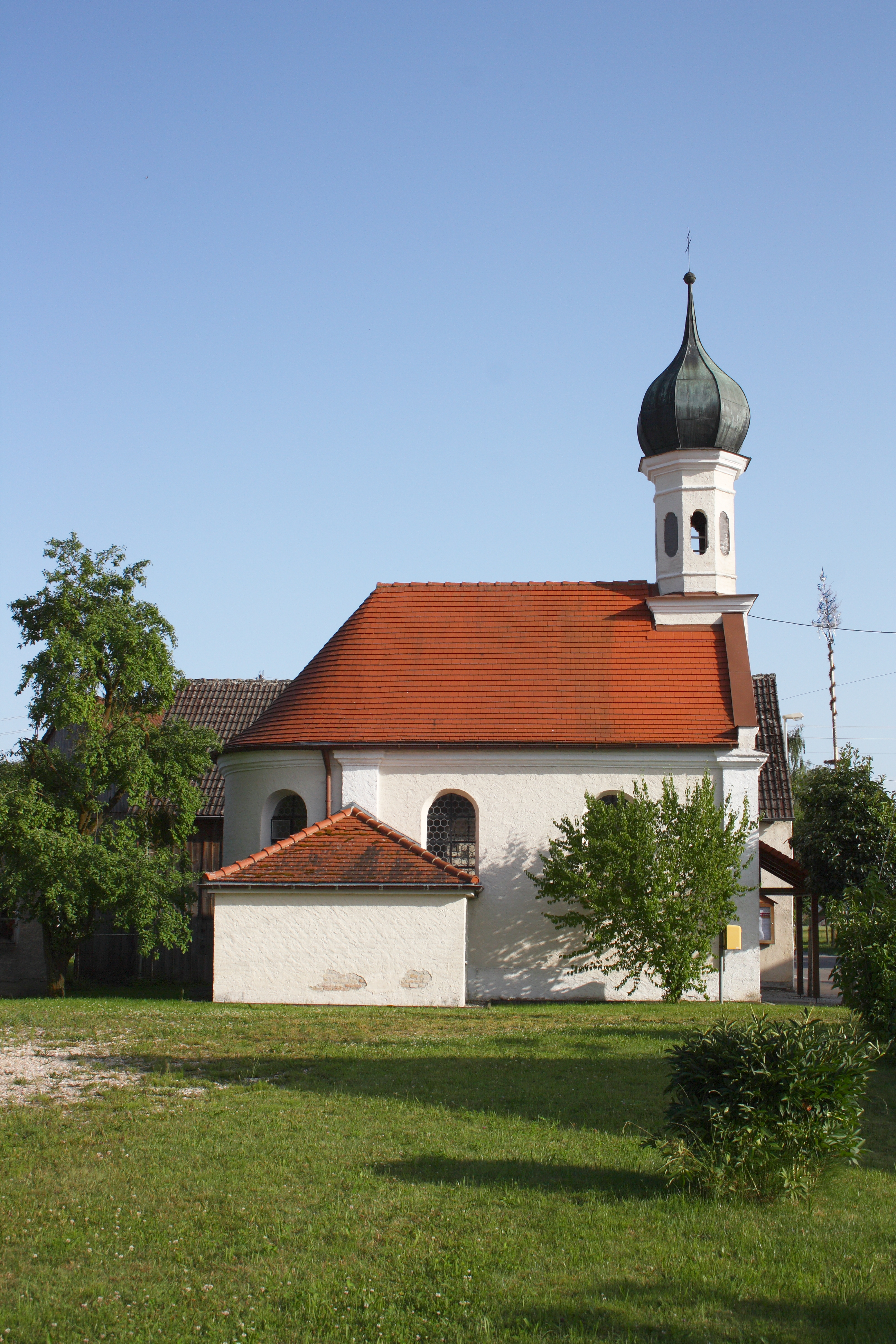 Kapelle St. Wendelin in Hagenried, einem Ortsteil von Münsterhausen im Landkreis Günzburg (Bayern)